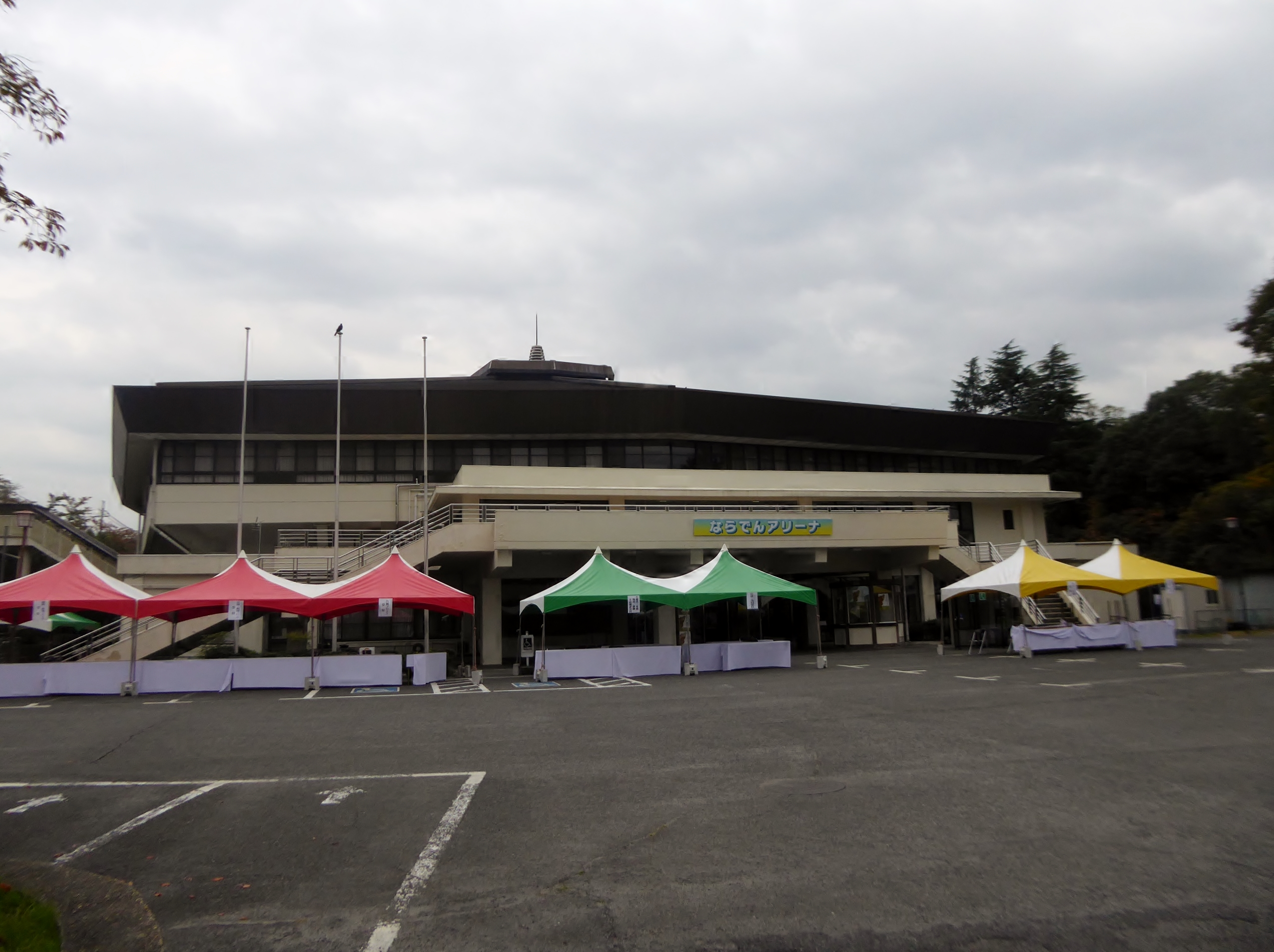 ならでんアリーナを撮影。